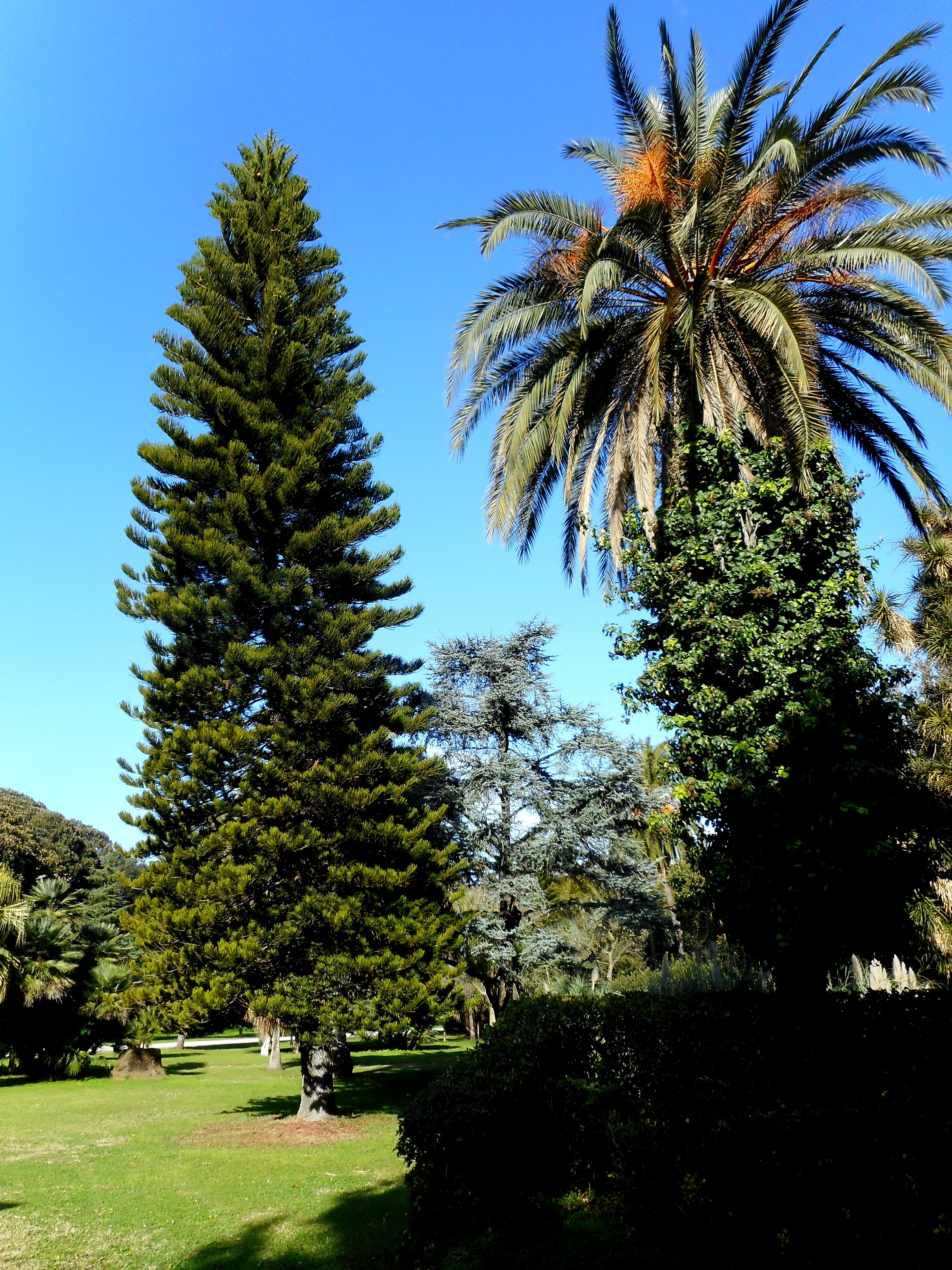 Veduta del giardino di Villa Malfitano